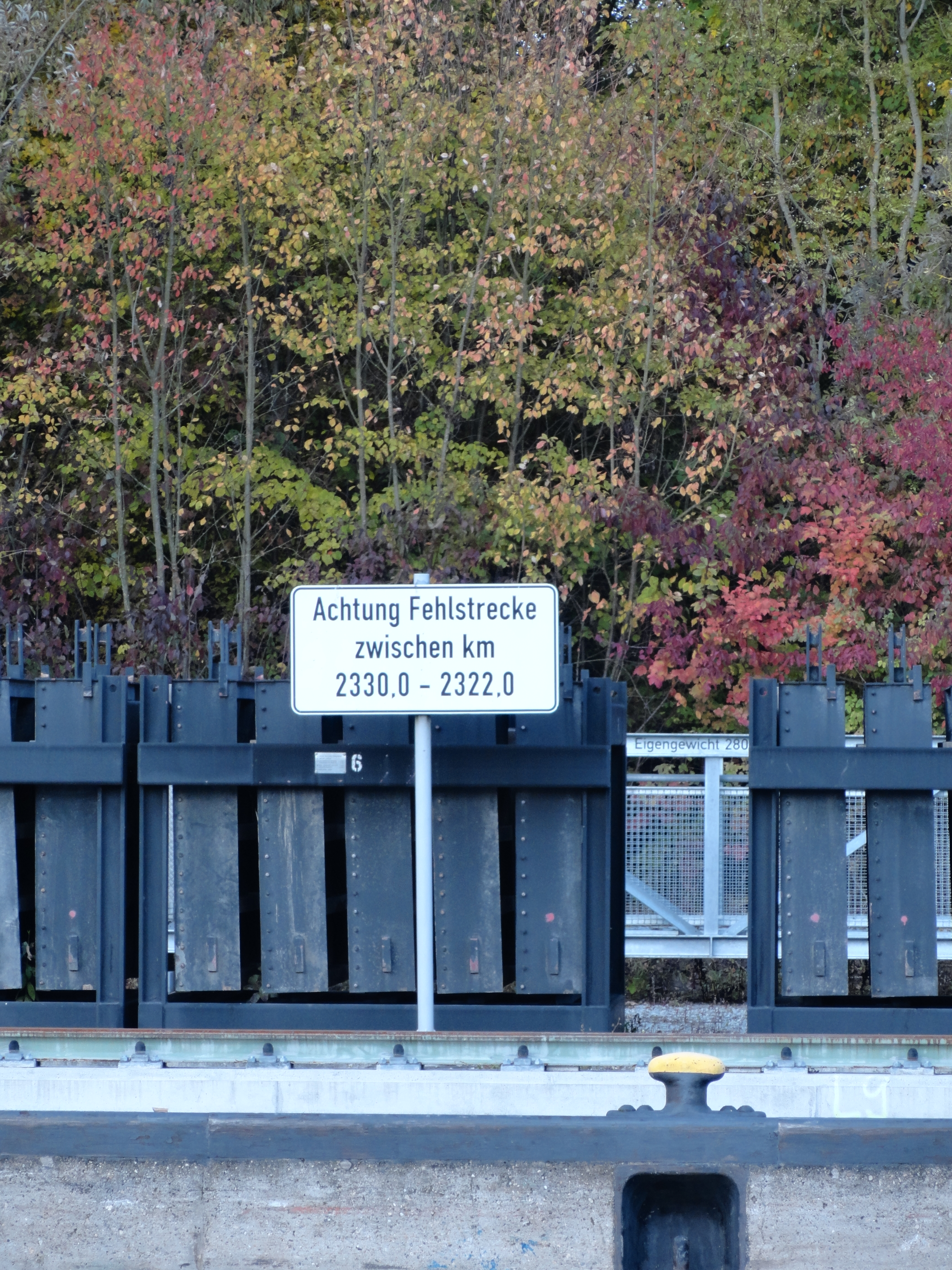 Hinweisschild auf Fehlstrecke der Donau bei Straubing